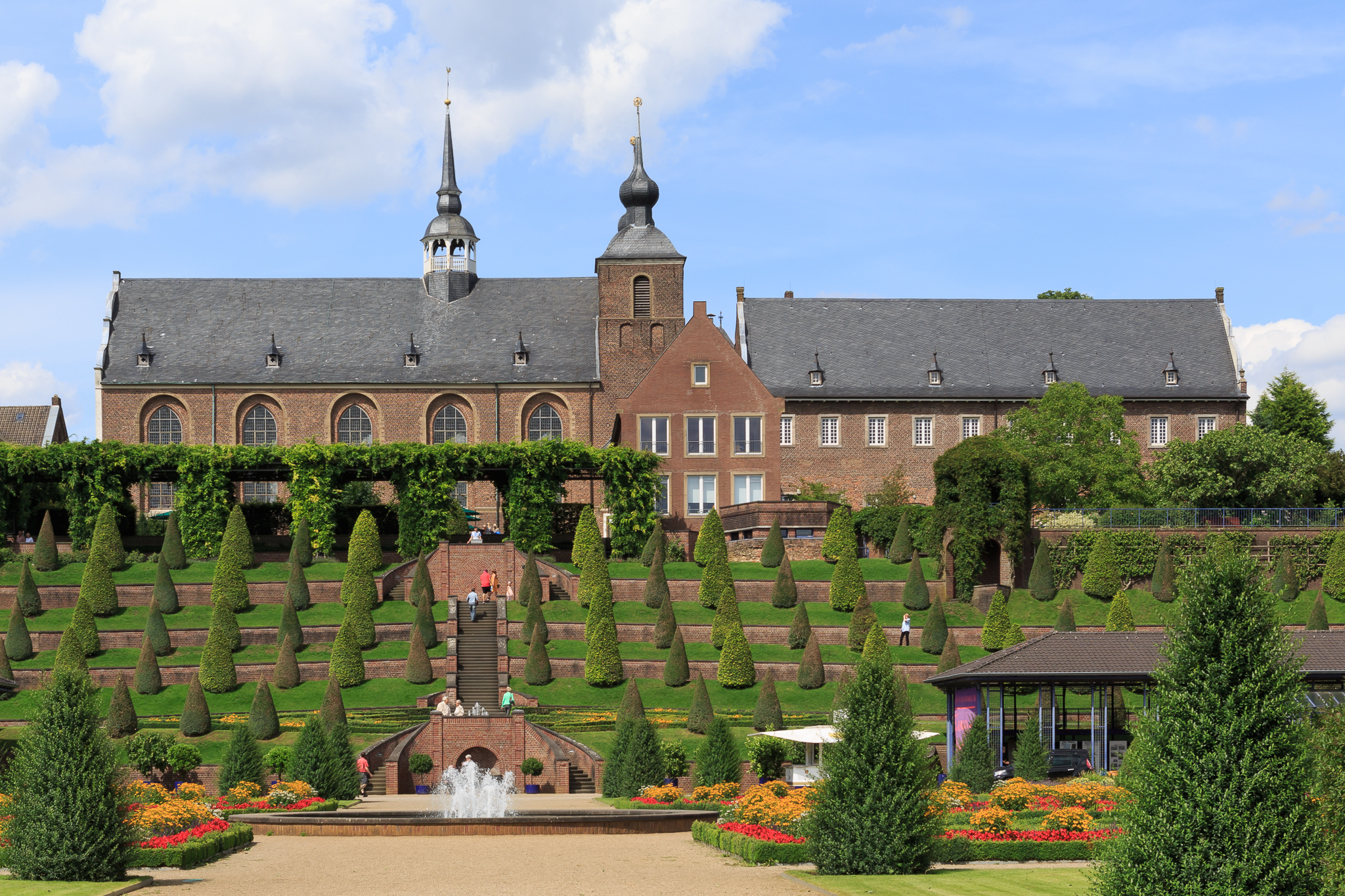 Kamp-Lintfort - Kloster Kamp - 2015